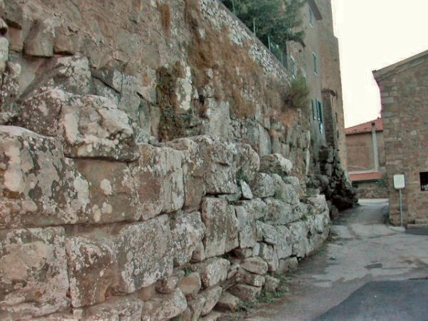 Autore: Utente:Trapanator; Fonte: Utente:Trapanator, foto amatoriale fatta da me il 22 agosto 2005; Descrizione: Le mura ciclopiche di Vetulonia